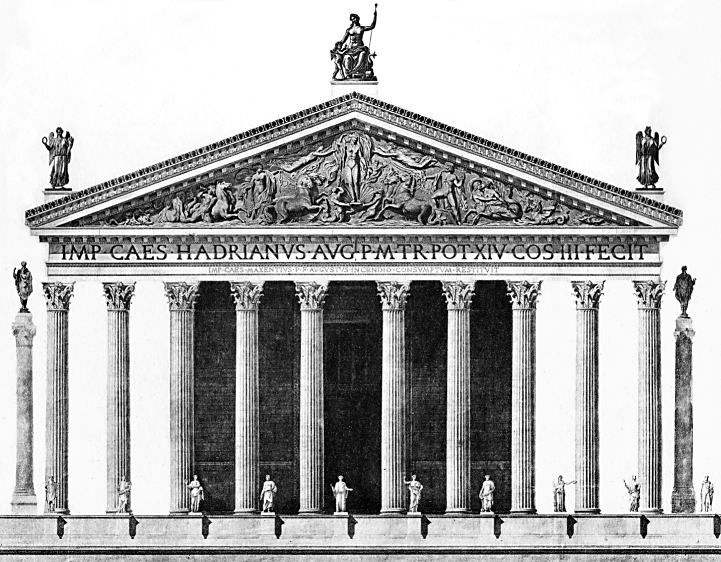 Tempel van Venus en Roma (reconstructie). Heliogravure door Chauvet (1830)